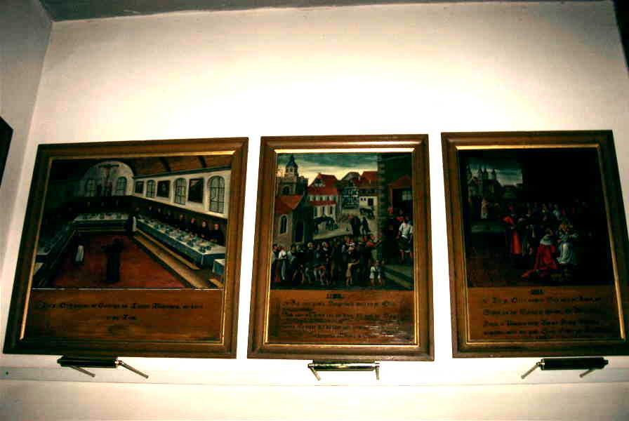 Bildertafeln zum Leben des Bischofs Otto